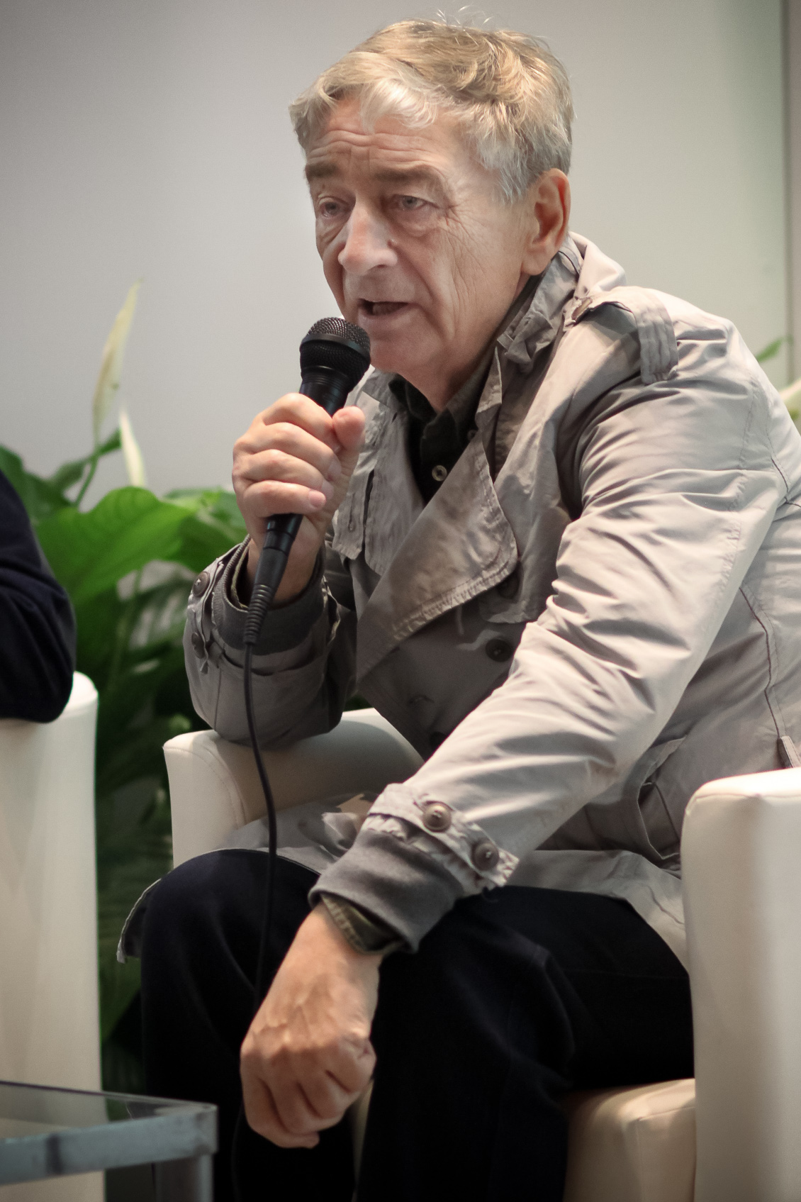 Эдуард Успенский на ММКВЯ-2011